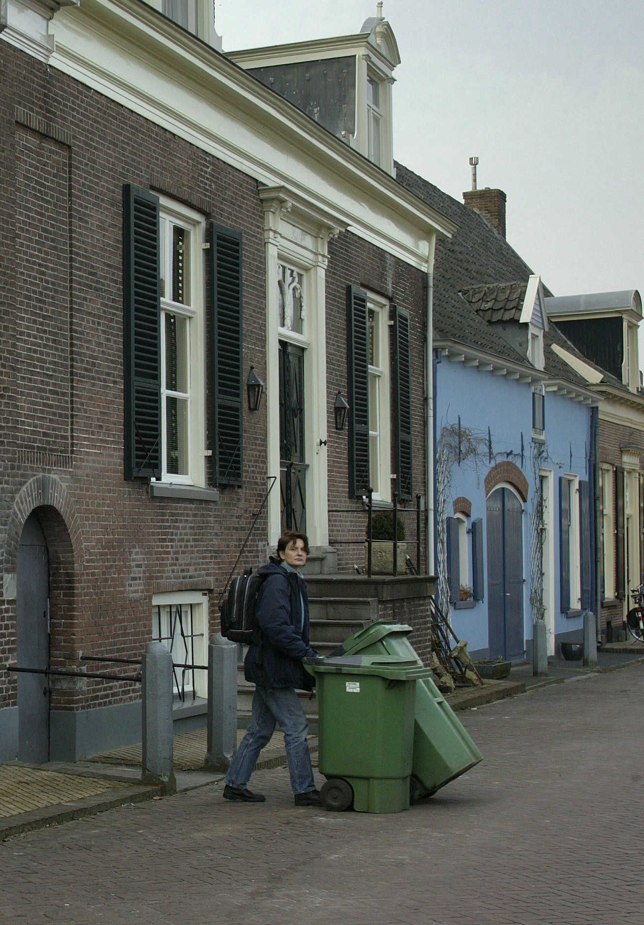 Persoon: Mariël bezig met het verwijderen van de kliko's